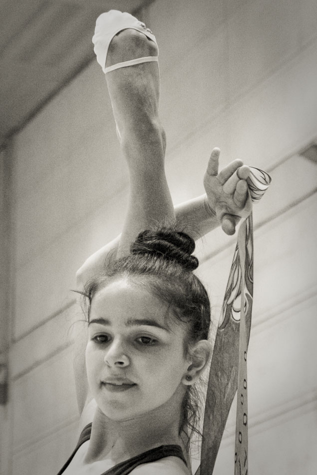 La gimnasta rítmica Jennifer Colino durante un entrenamiento en el CAR de Madrid en diciembre de 2003.